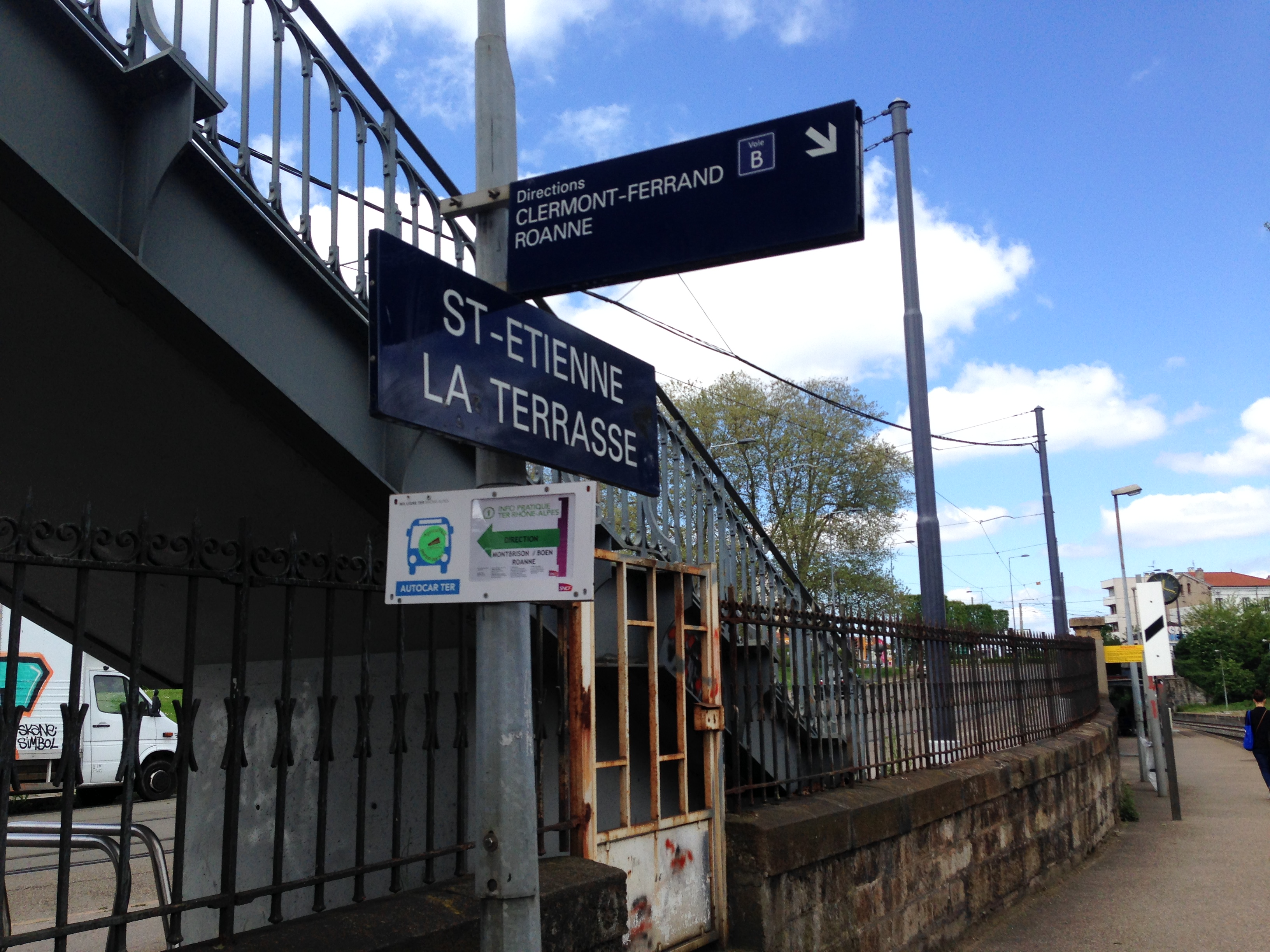 Le quai de la gare de Saint-Étienne-La Terrasse